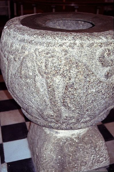 Helstrup Kirke, døbefont; Randers Kommune, Denmark